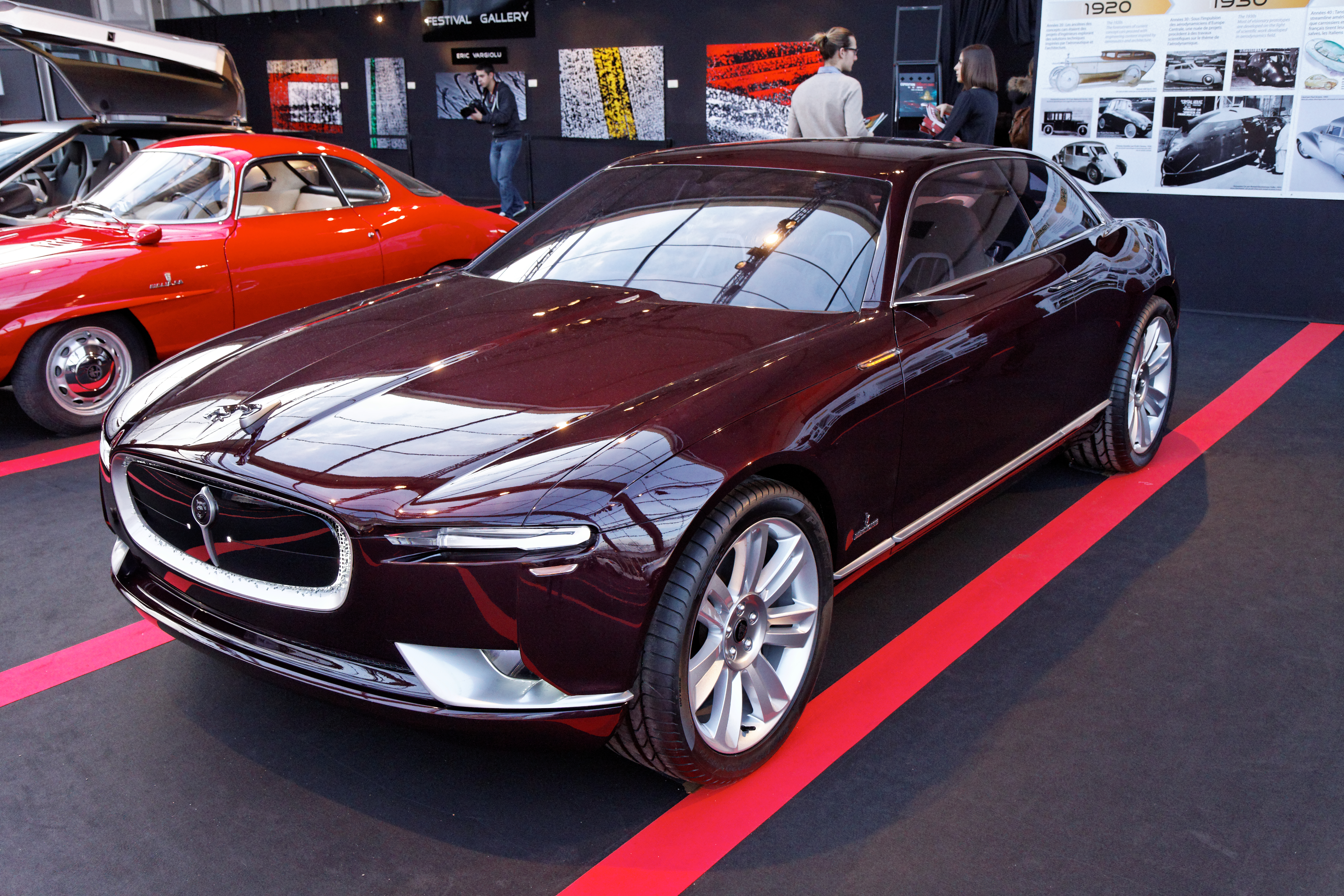 Bertone Jaguar B99